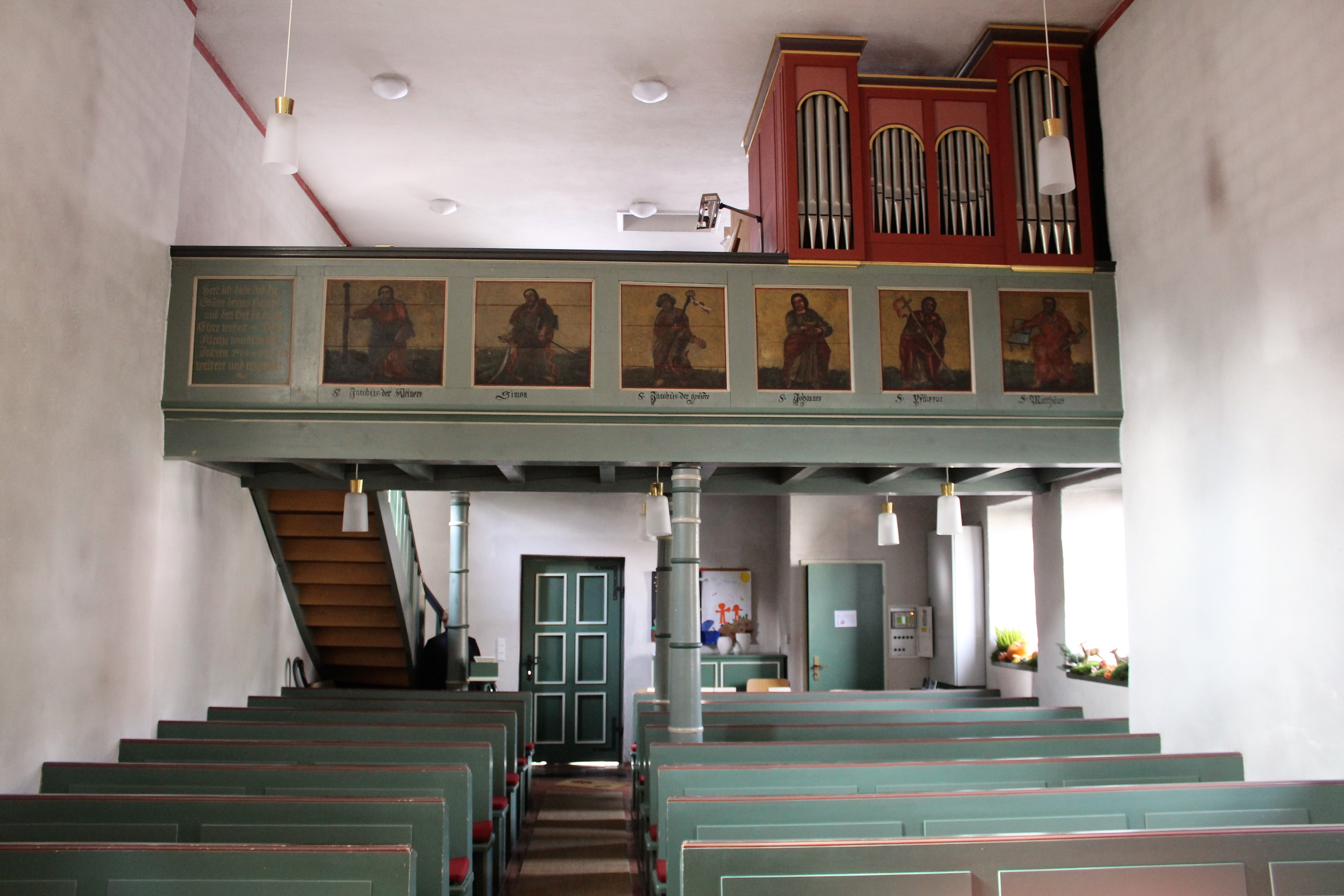 Evanglische Kirche Weipoltshausen, Gemeinde Lohra, Landkreis Marburg-Biedenkopf, Hessen, Deutschland